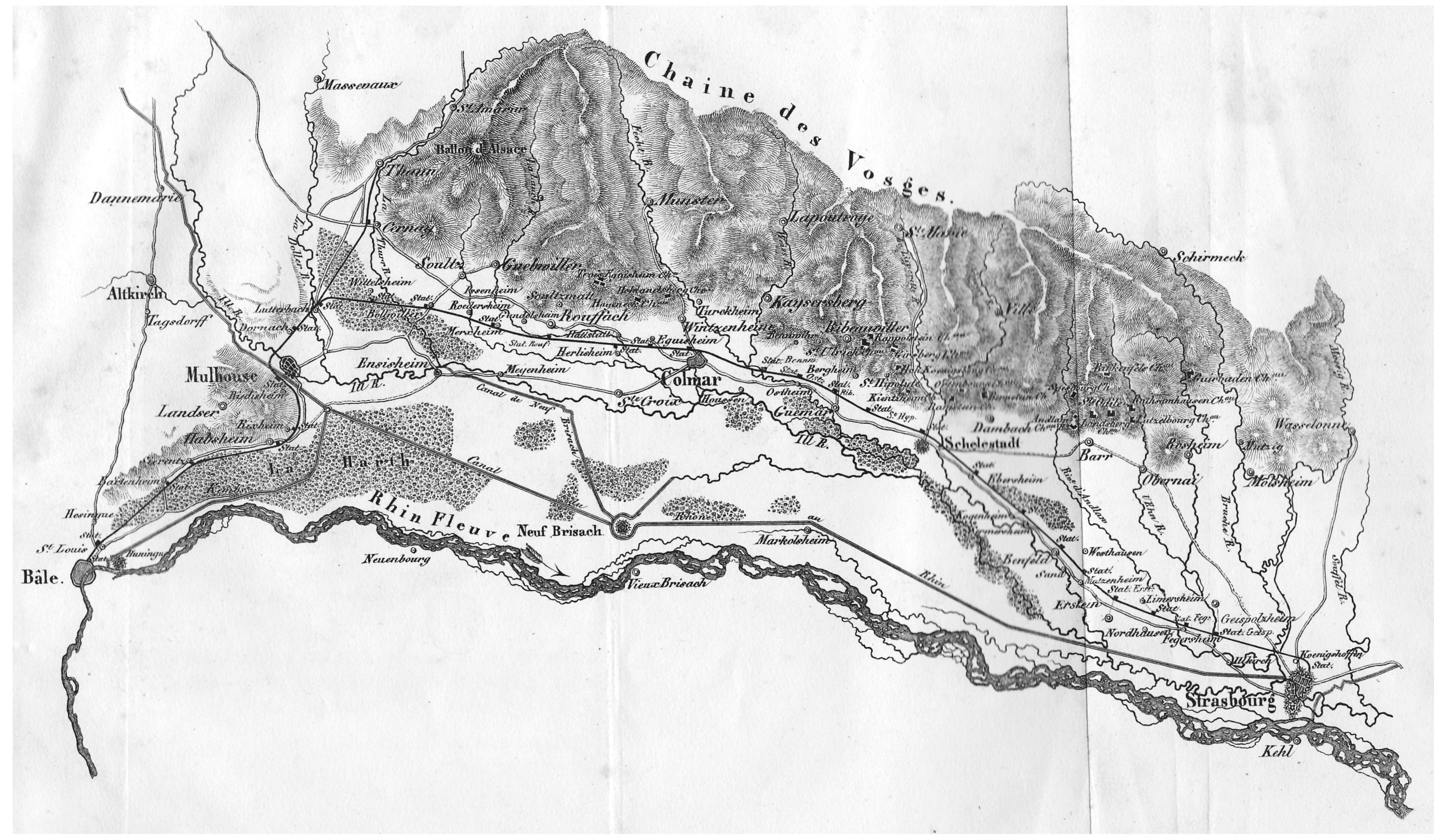 Plan de la ligne Strasbourg-Bâle